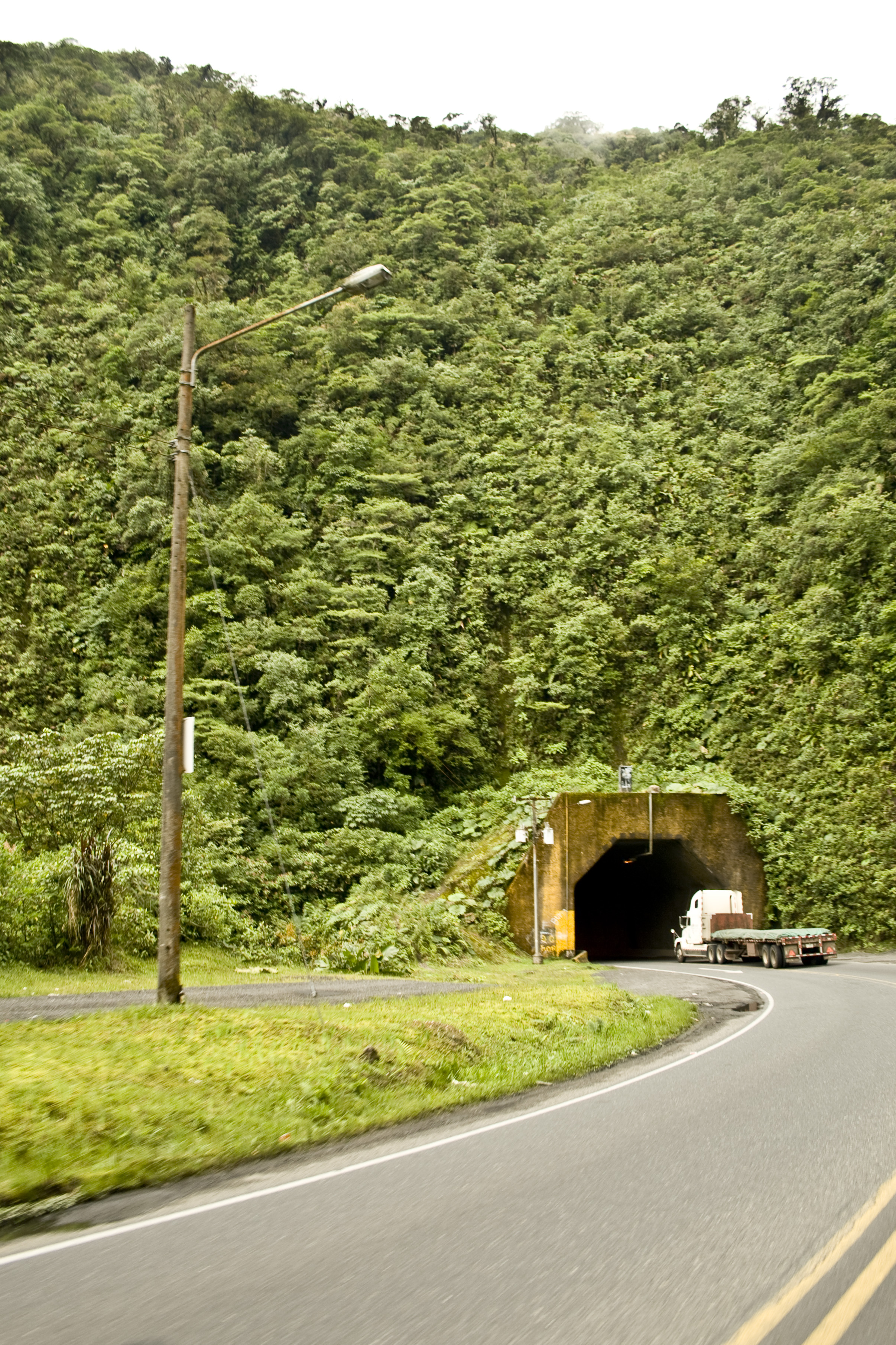 Acceso al Túnel Braulio Carrillo, con dirección hacia San José.